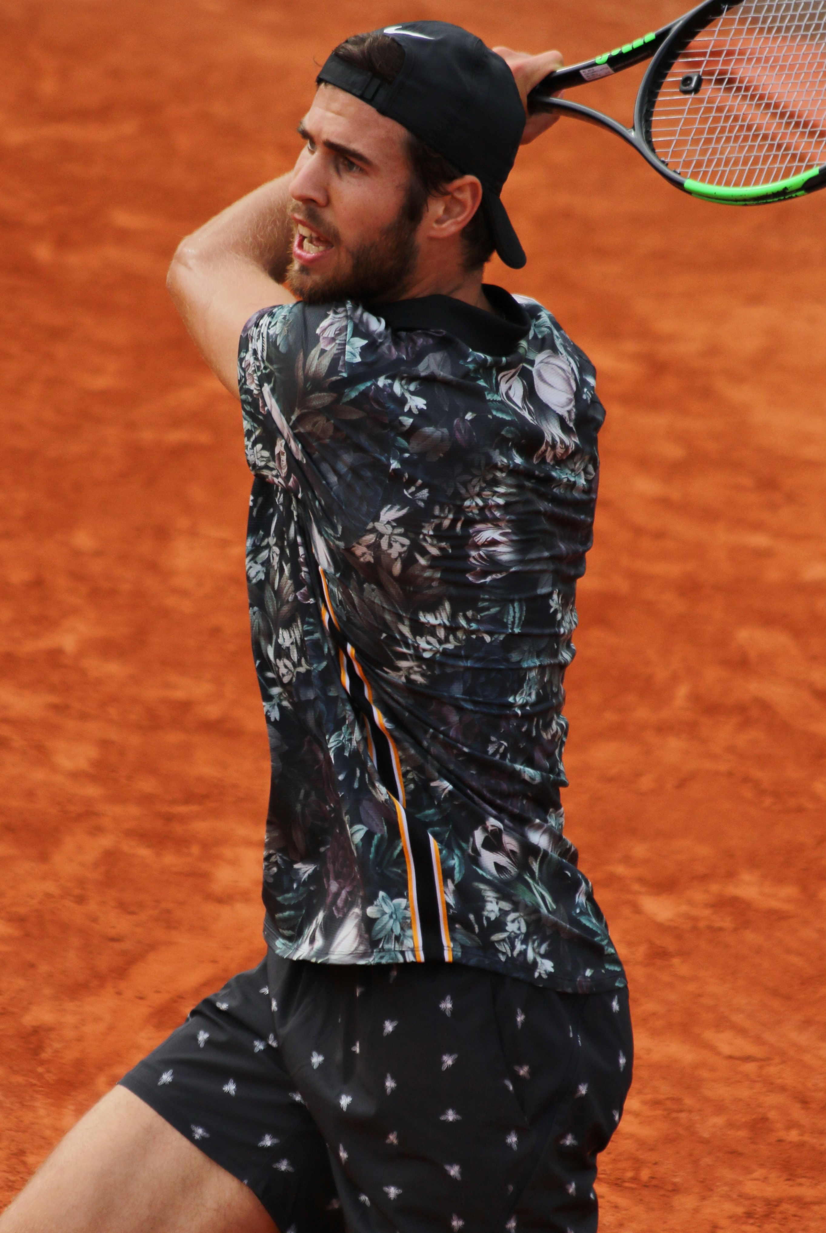 Khachanov RG19 (17)